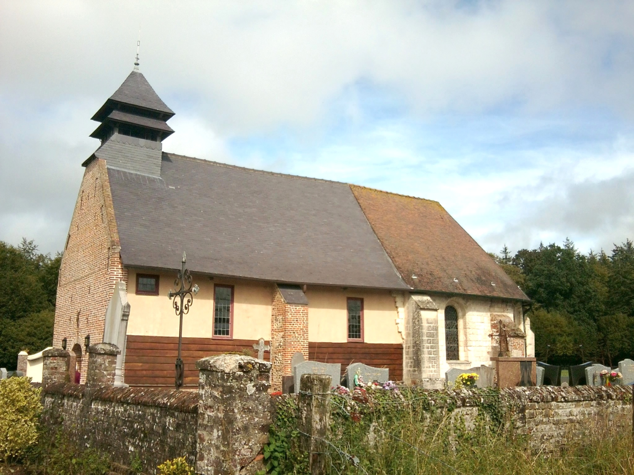 Eglise de la Nativité de la Vierge du XIIe siècle. Toiture à deux couleurs et bâtiment bâti en briques, torchis, pierre et bois (composition typiquement picarde).